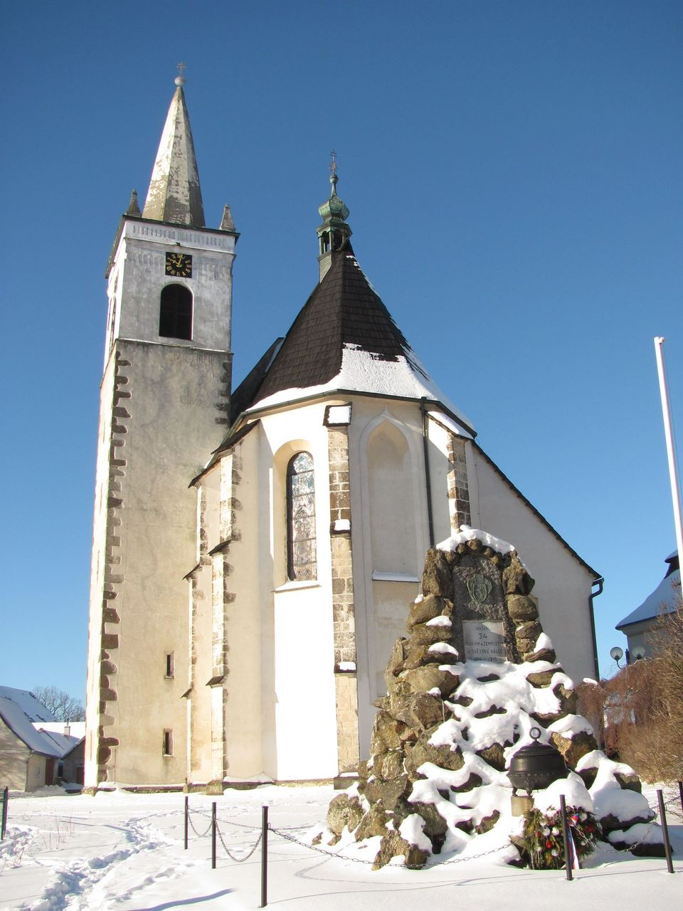 Kostel Narození Panny Marie v Miličíně s pomníkem padlým z 1. světové války.